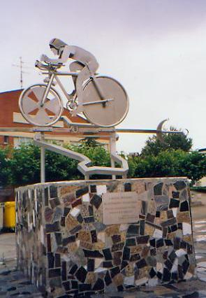 Denkmal für Miguel Indurain in Azagra/Navarra (Spanien)